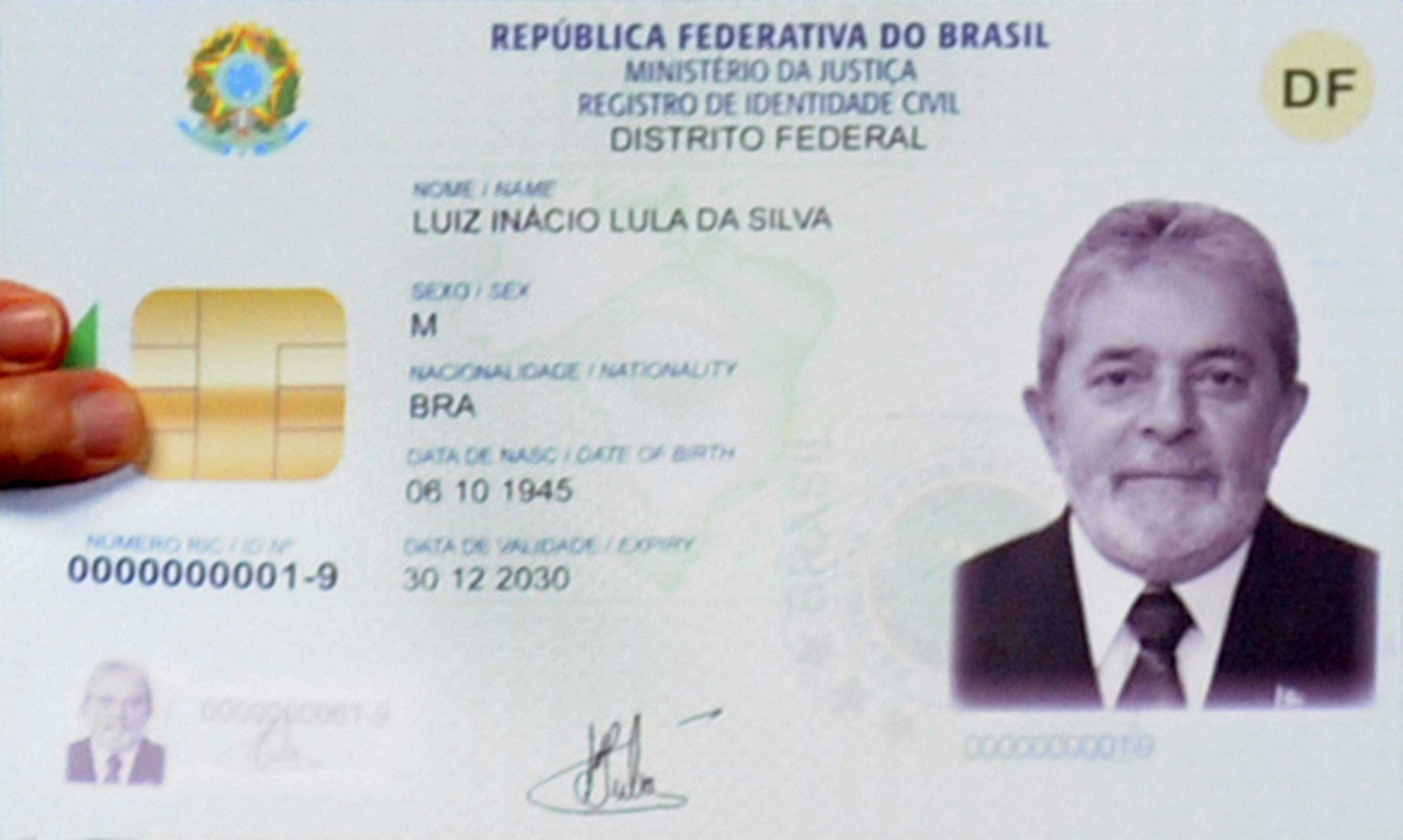 Modelo do novo RG brasileiro. Na foto, o presidente da época, Luiz Inácio Lula da Silva.